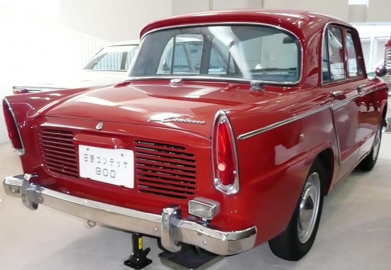 Hino Contessa 900 rear.